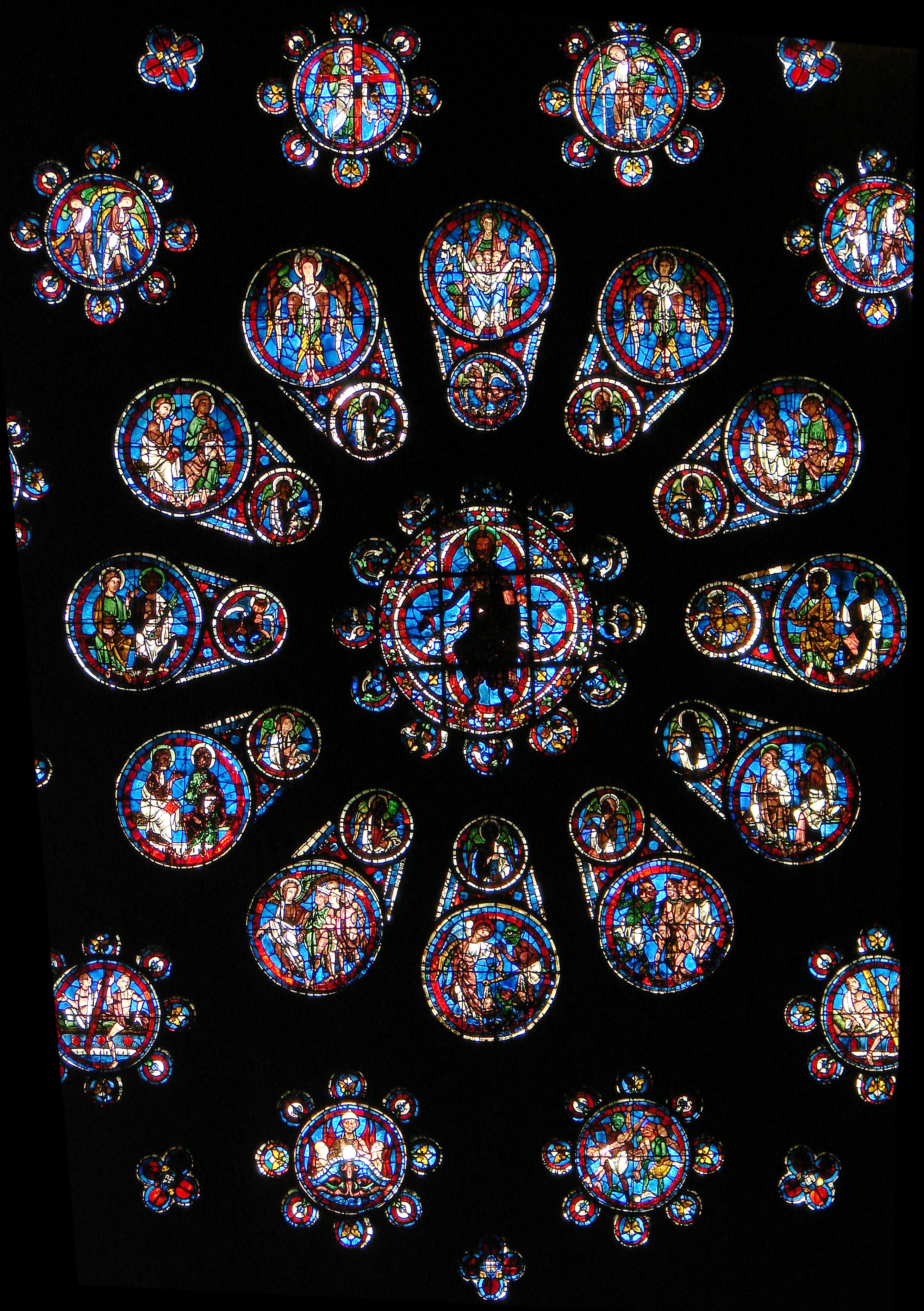 Rose de la façade de la cathédrale Notre-Dame de Chartres.